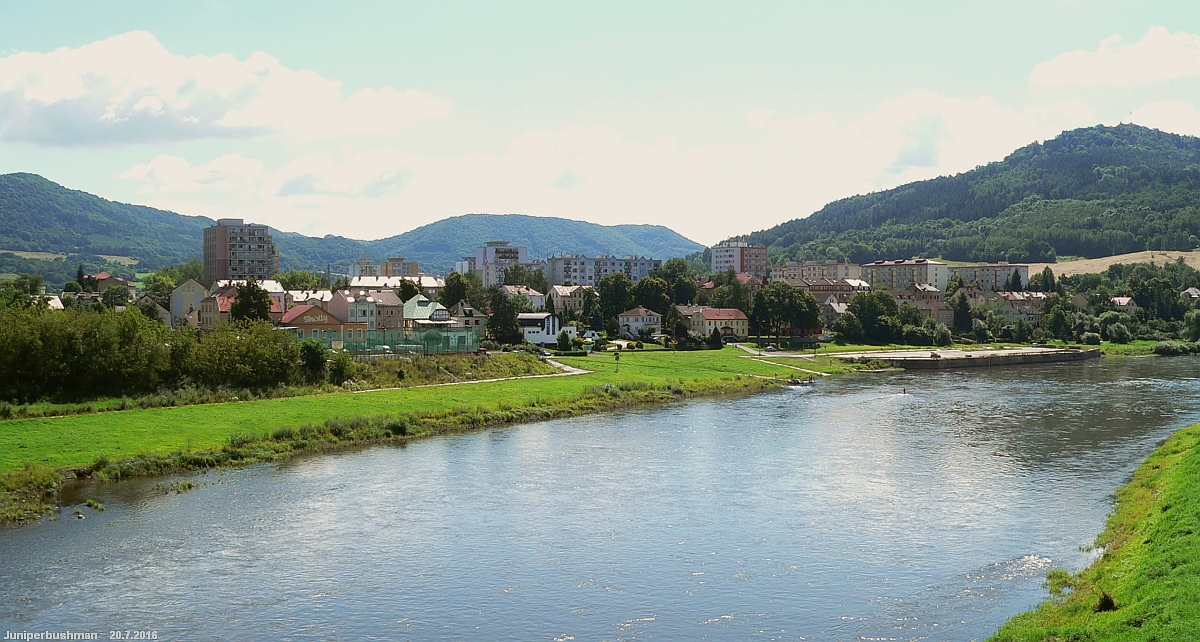 Pohled z nového mostu na Staré město